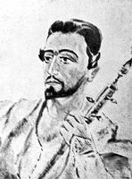 Sayat Nova. Portrait by Kodzhoyana AK. (Yerevan, 1945).